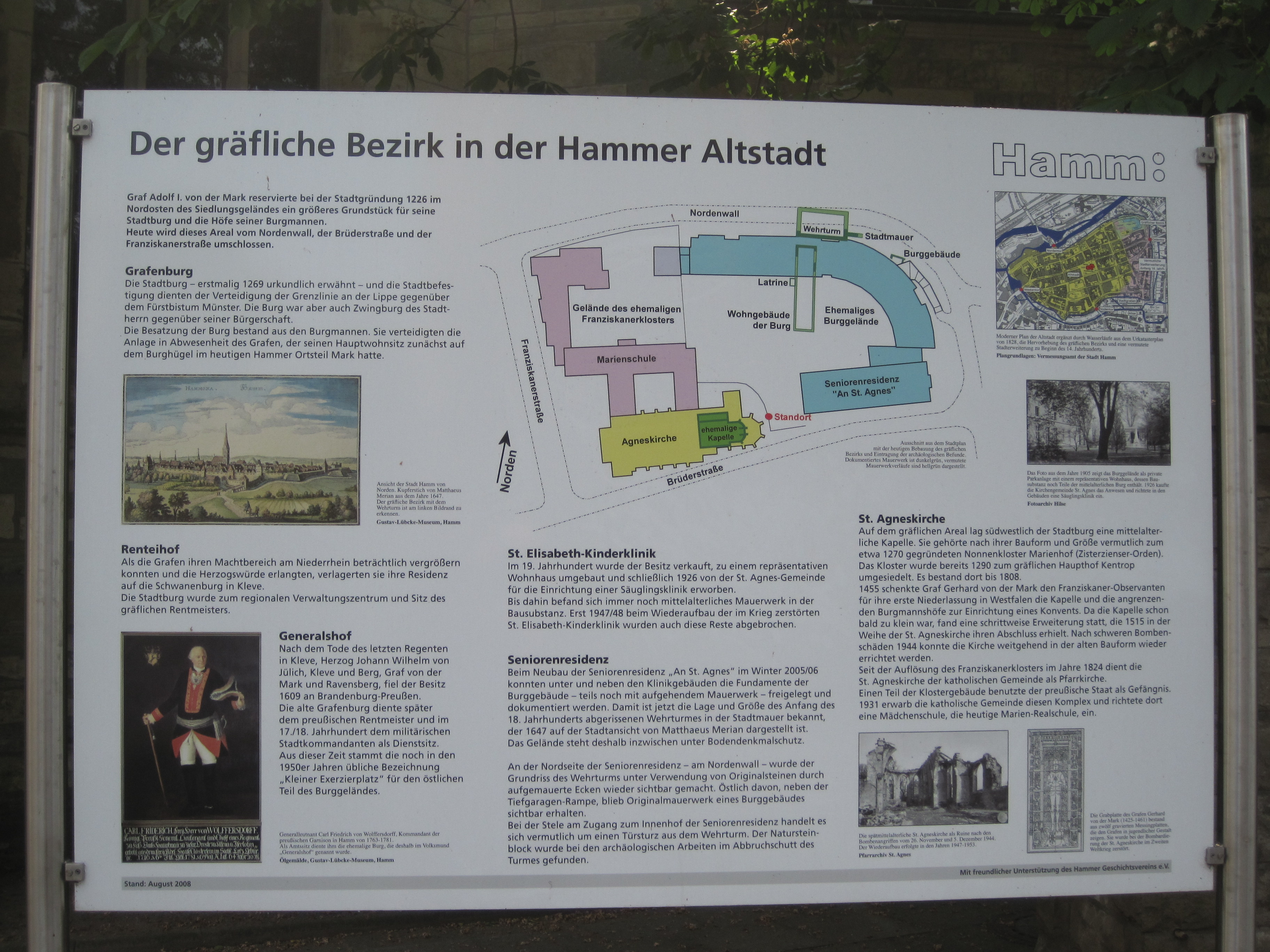 Dieses Foto zeigt eine Infotafel vor der St. Agnes-Kirche in Hamm.